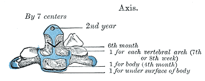 Axis.